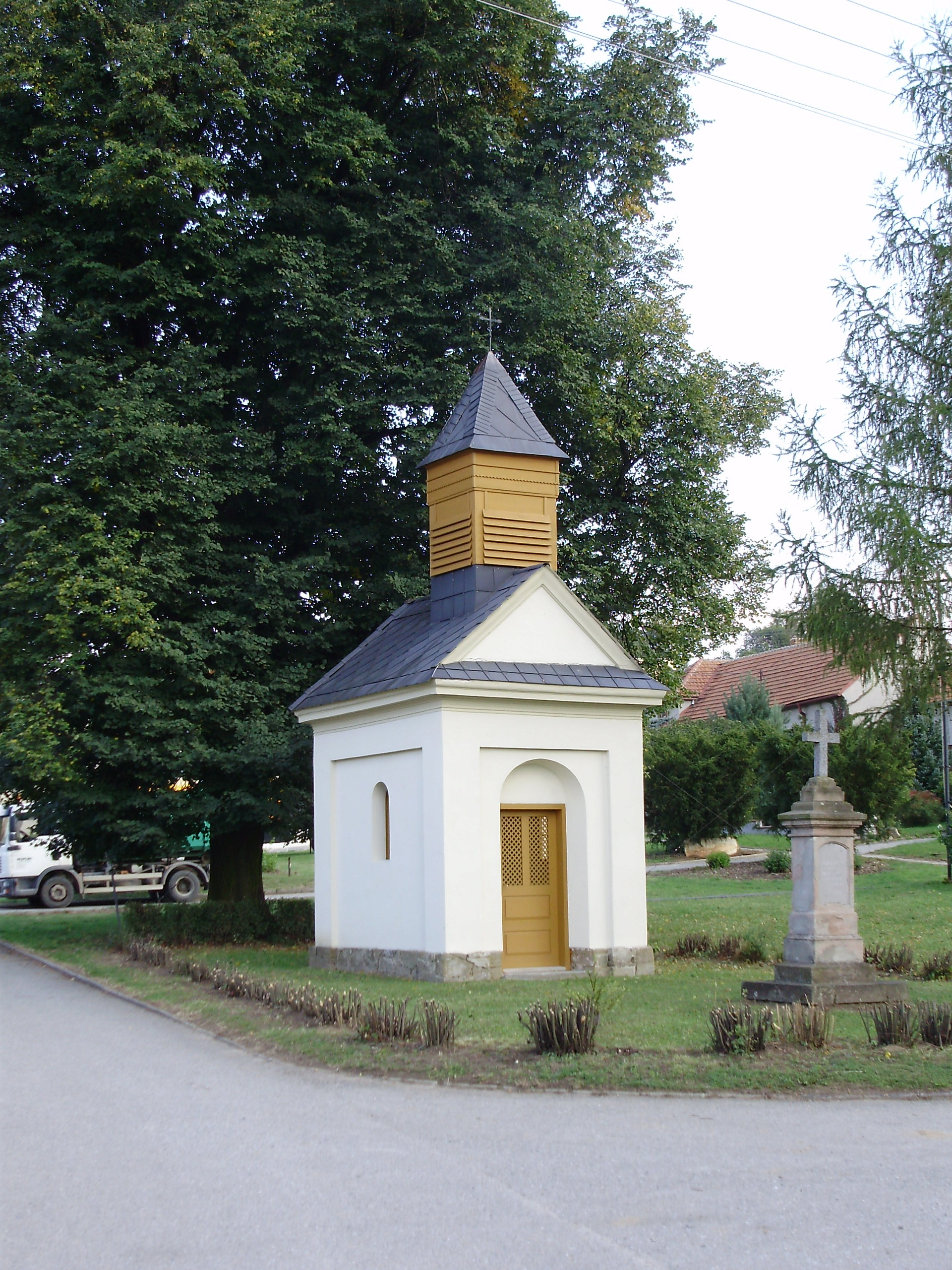 Kaplička svatého Františka Manerov